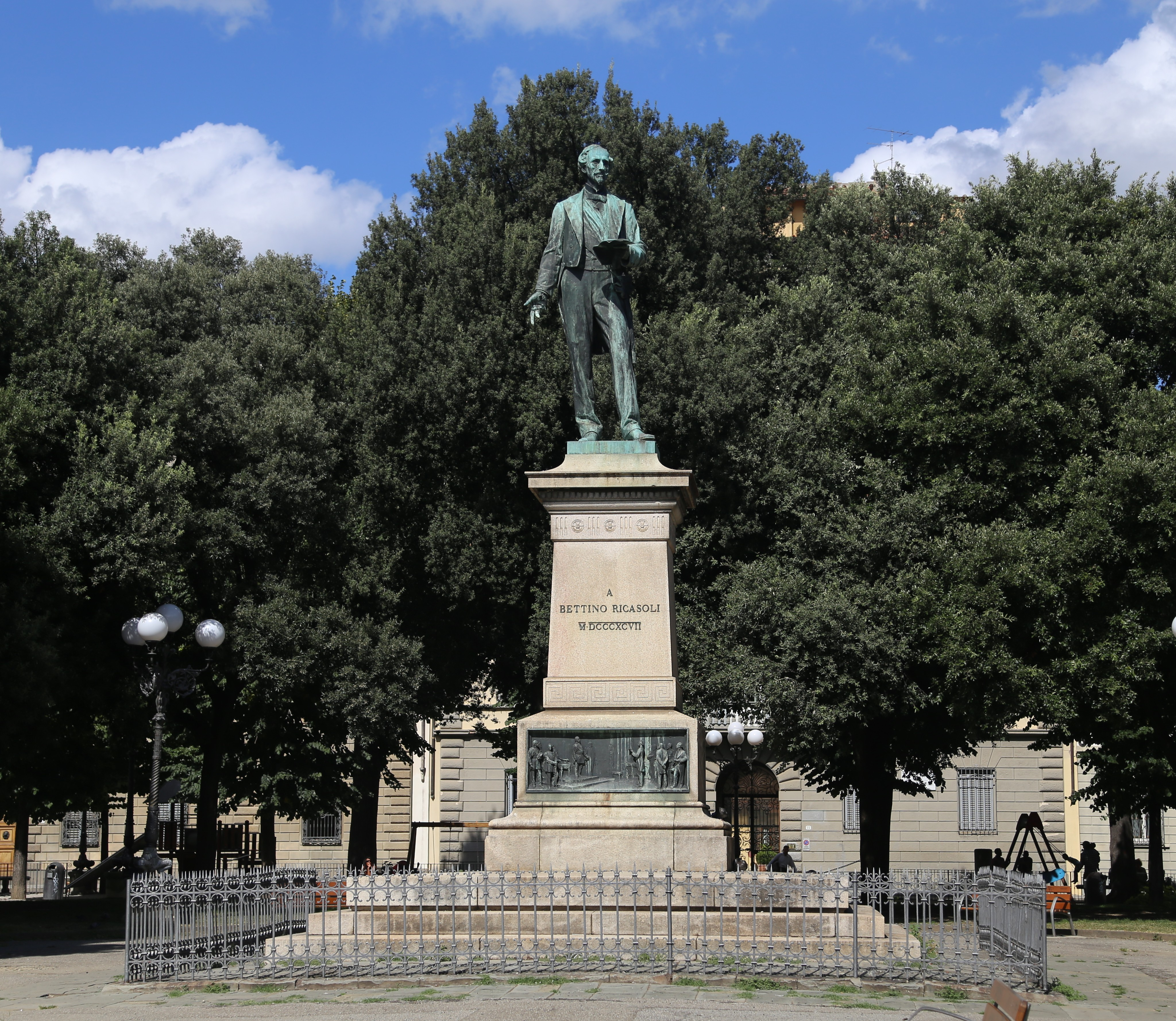 Statue Bettino Ricasoli, Piazza della Indipendenza, Florenz